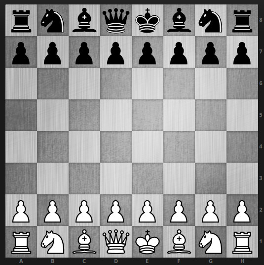 موقعیت اولیه مهره‌ها در صفحۀ شطرنج را نشان می‌دهد.